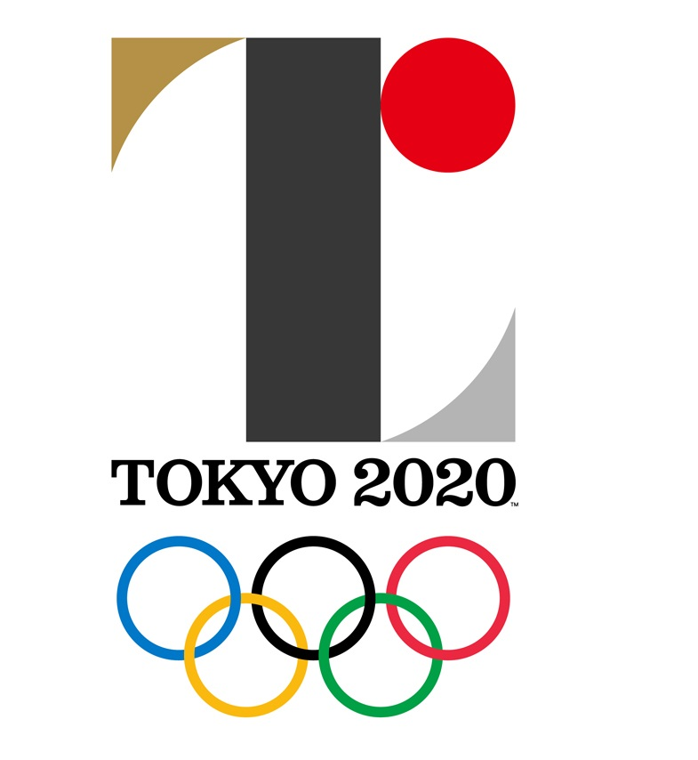 2015年7月24日に発表された、2020年東京オリンピックのロゴ。後に変更される。